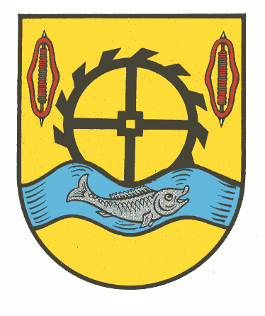 Wappen von Oberweiler-Tiefenbach